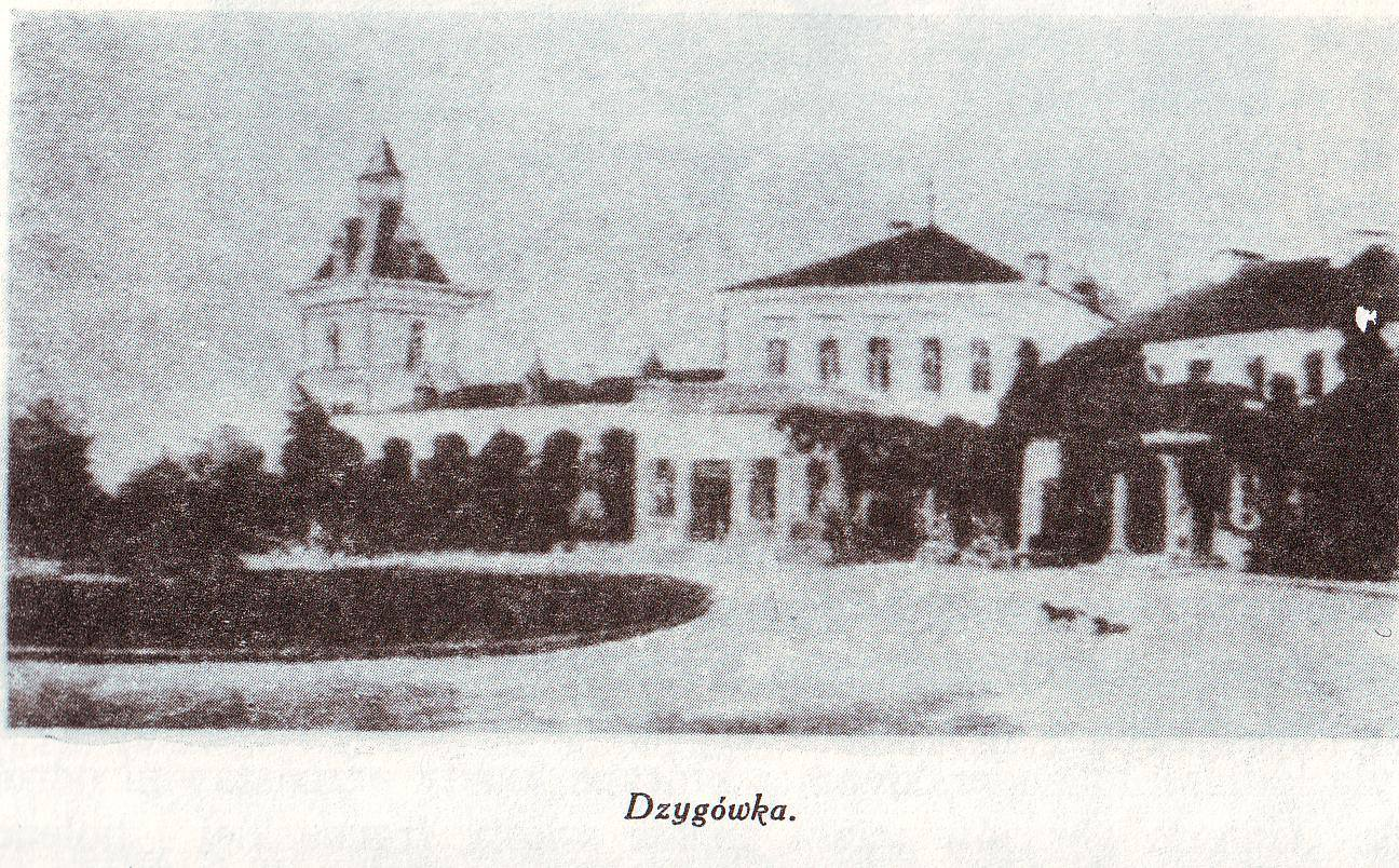 Dzygówka - pałac Jaroszyńskich